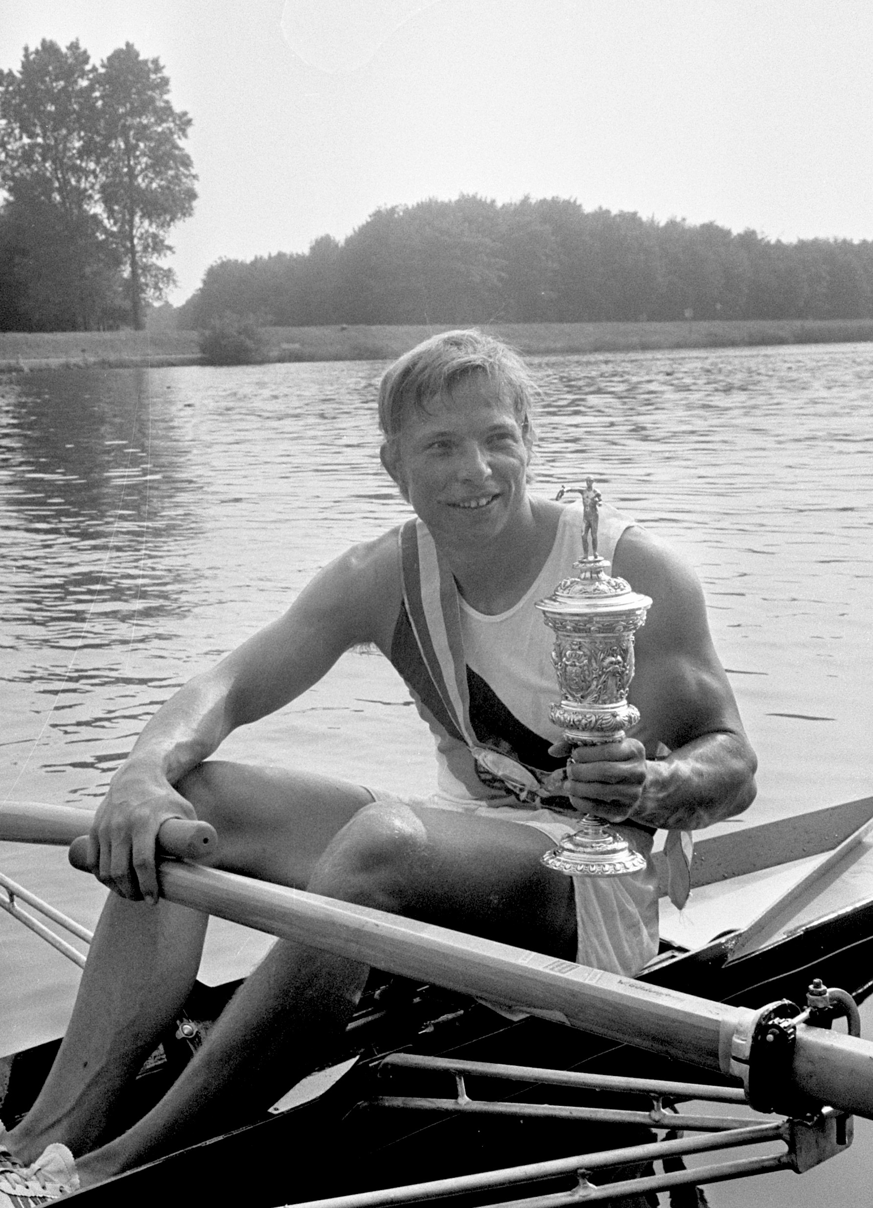 Roeiwedstrijden om Koninklijke en Hollandbeker op Bosbaan skiffeur W. Goldpfennig met de Hollandbeker